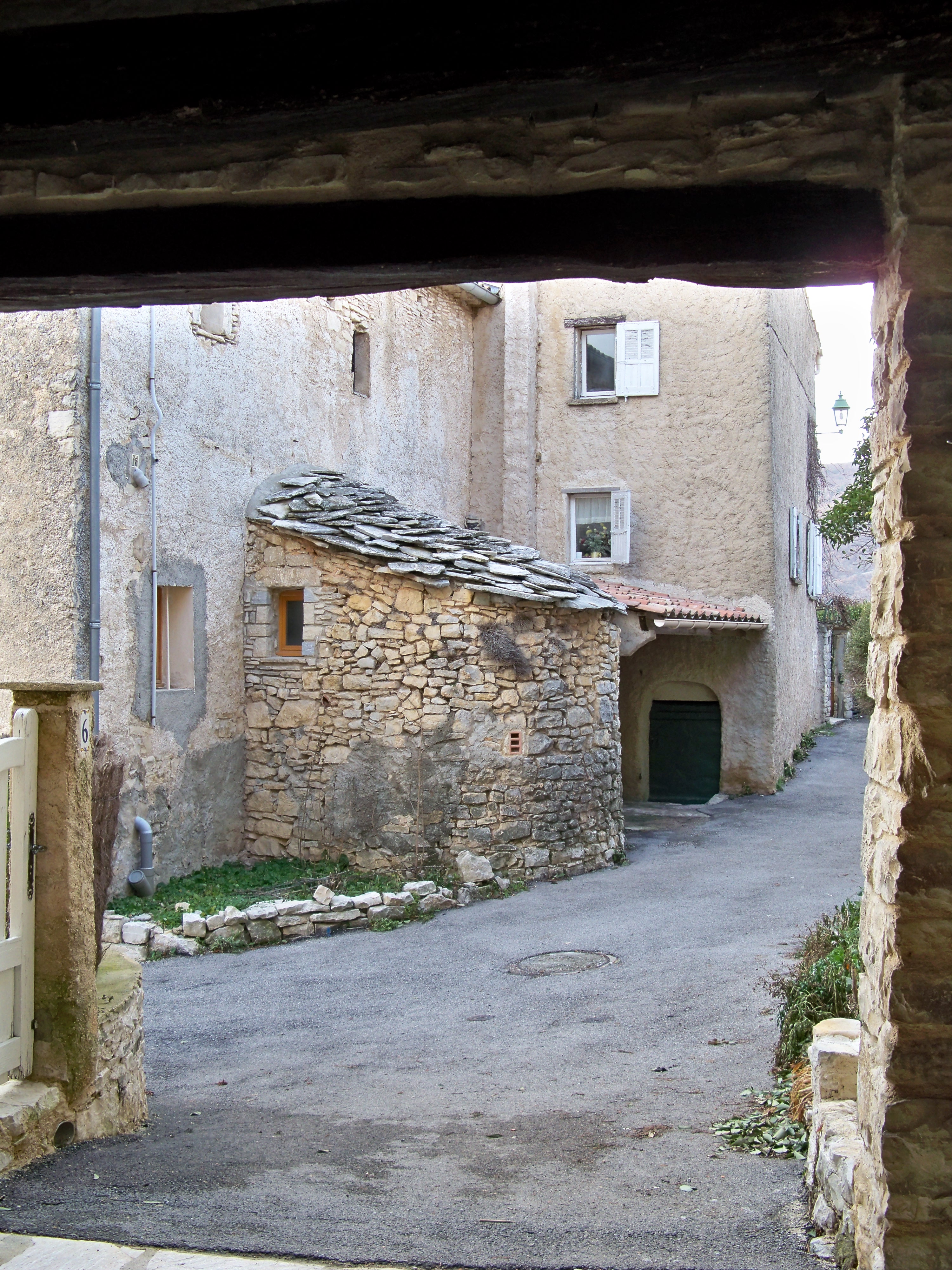 appentis avec toiture en lauze à l'Hospitalet (04), France